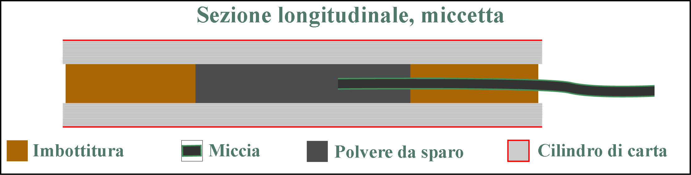 Coupe longitudinale schématique d'un pétard à mèche